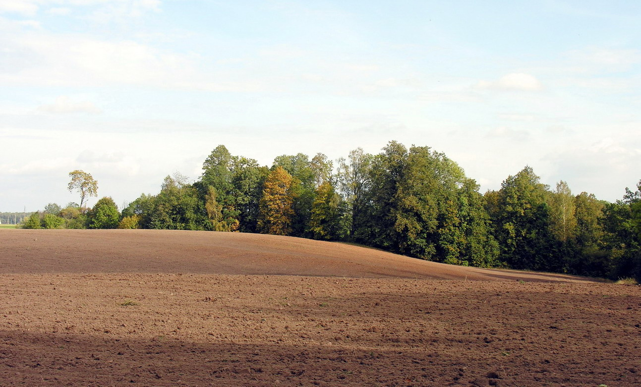 Rudeniškas vaizdelis Viki draugams Foto: Algirdas, 2006 m. spalio mėn.